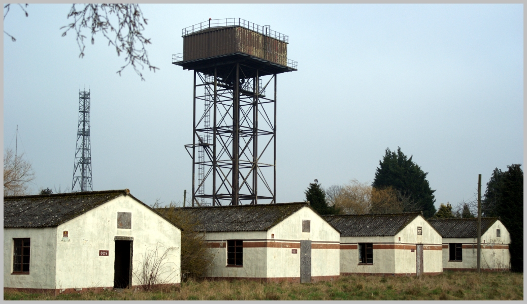 010 Upper Heyford